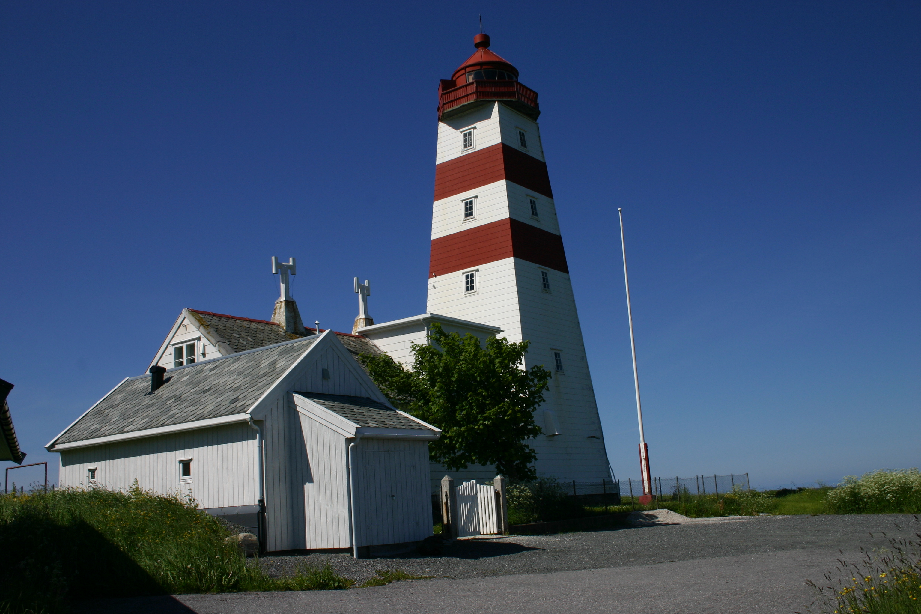 Alnes fyr